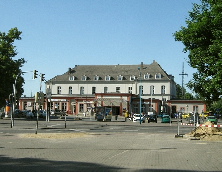 Der Hauptbahnhof in Neubrandenburg